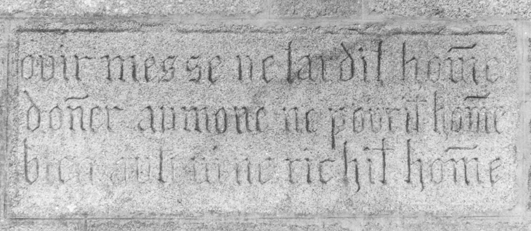 Inscription médiévale en remploi dans la nef de l'église de Cléder